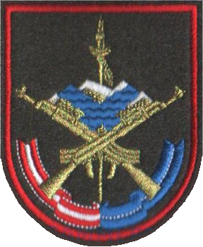 Нарукавный знак 21-й ОМСБр (Тоцкое)